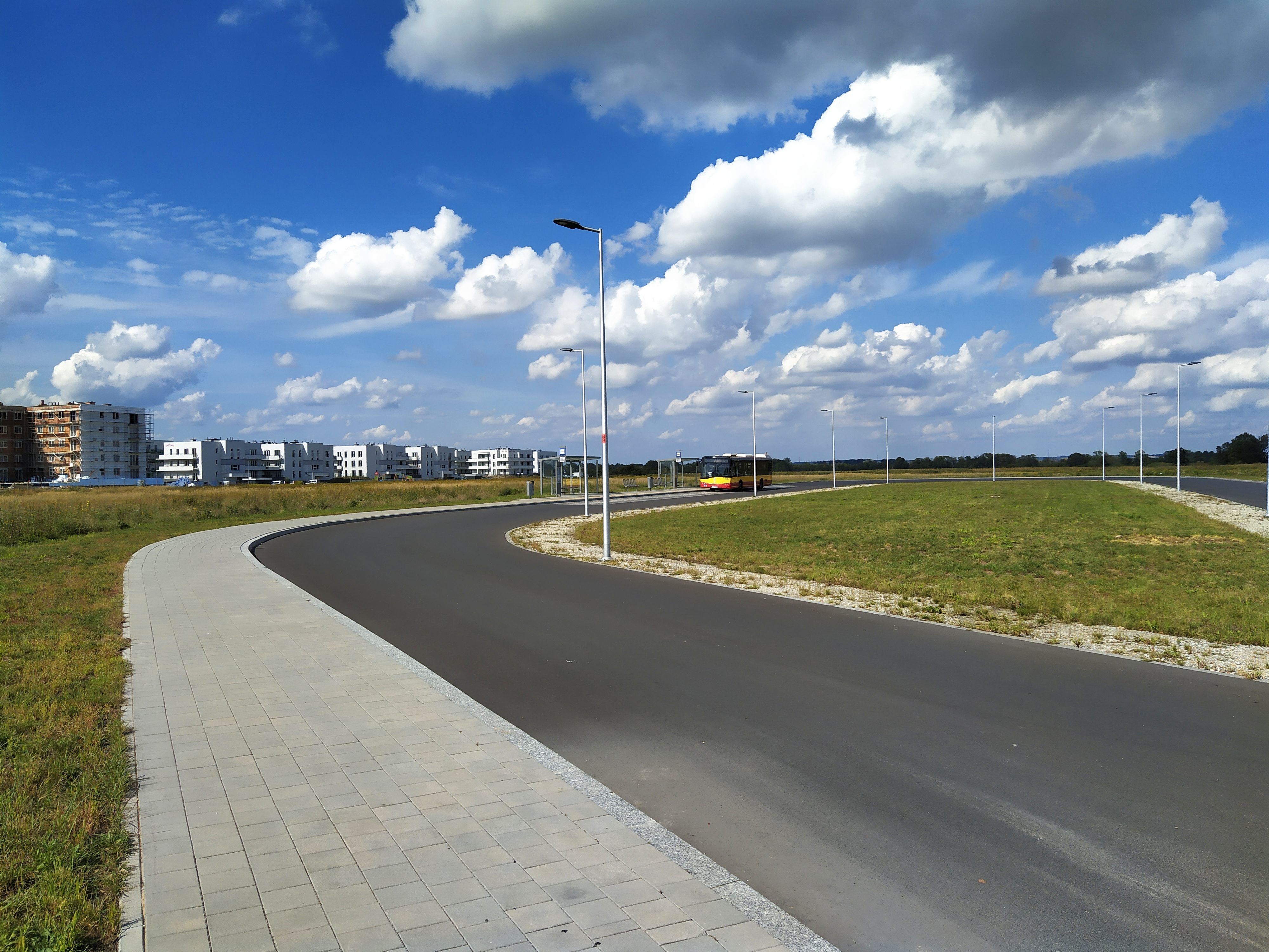 Pętla autobusowa przy ulicy Kminkowej na wrocławskim osiedlu Lipa Piotrowska, w tle widać nowe zabudowania.